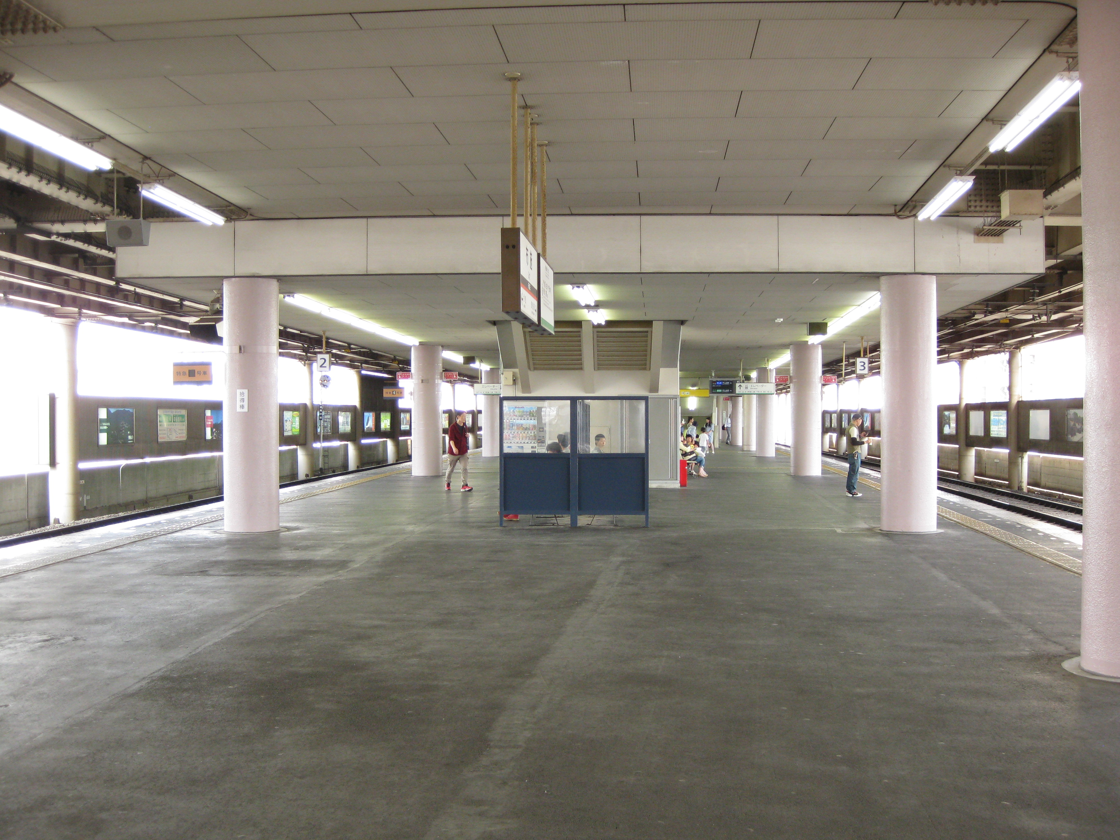 布施駅大阪線用プラットホーム